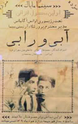 l'affiche du film Âbi o Râbi